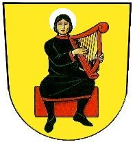 Wappen des Ortes Arnoldsweiler, Abb. des hl. Arnold von Arnoldsweiler